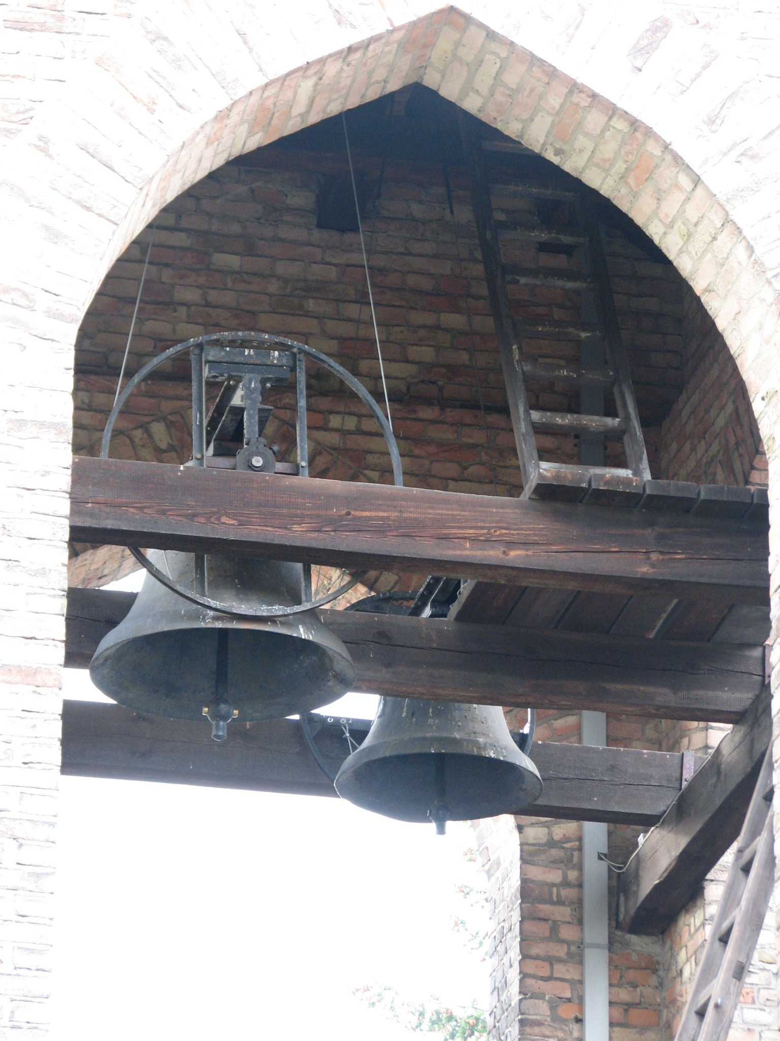 Die erhaltenen Kirchenglocken des Theodor-Fliedner-Gemeindeheims